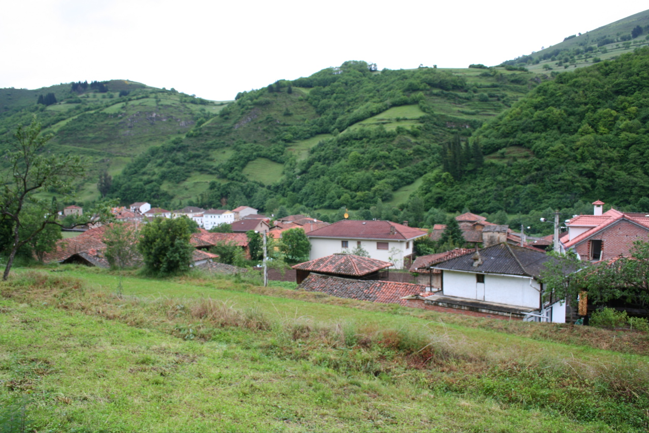 Imagen de Tuña, en el concejo de Tineo en Asturias